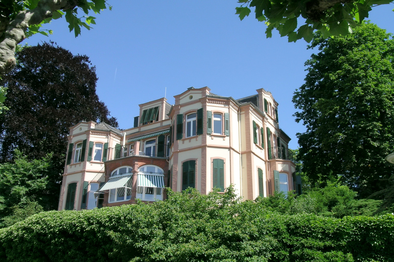 Landhaus in Biebrich am Rhein, Quartier Richard Wagners